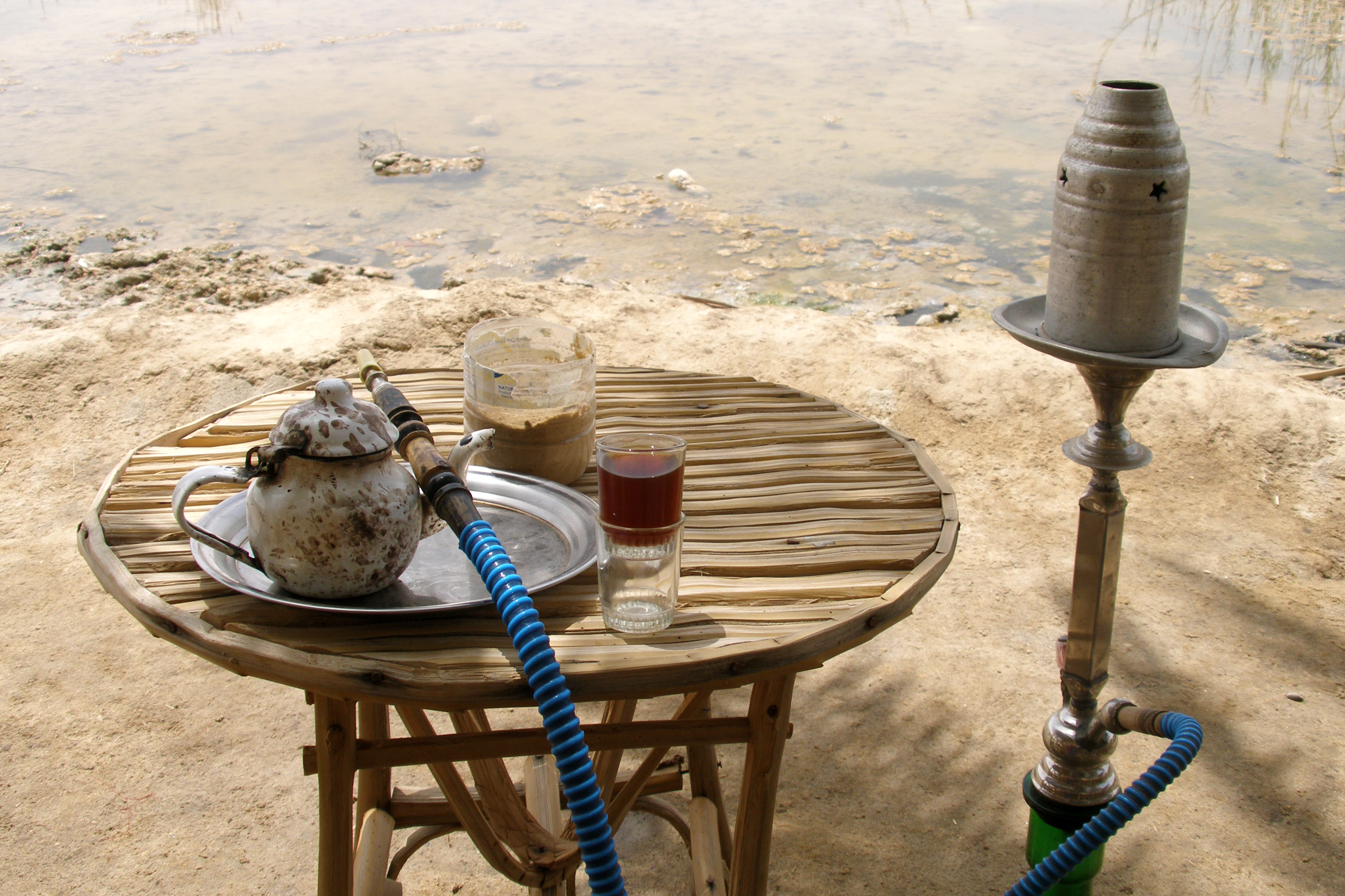 Siwa tea, Egypt (2007-05-109)